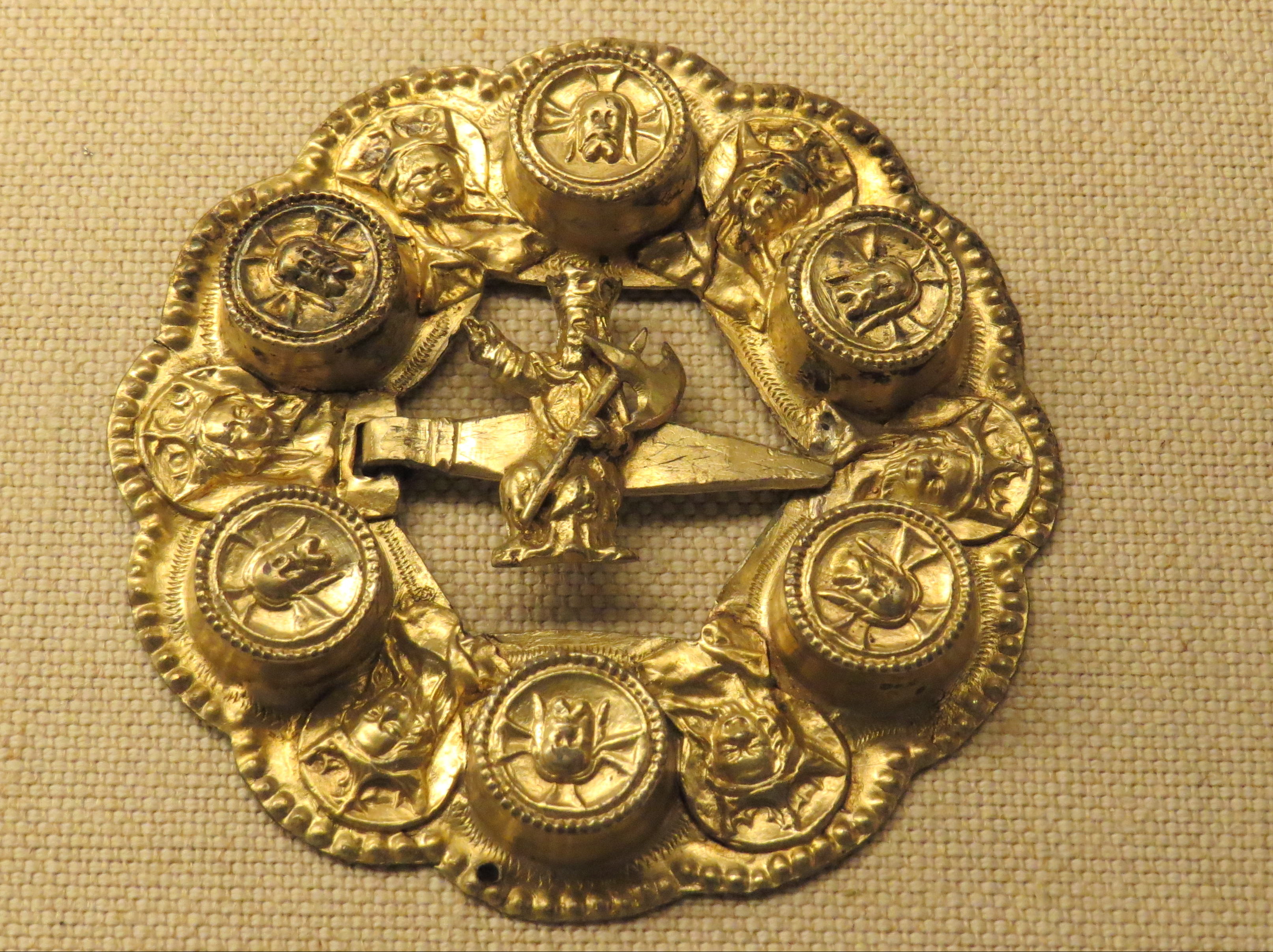 Bolesølje med Hellig Olaf, bergensisk arbejde fra 1500-årene, Nationalmuséet i København